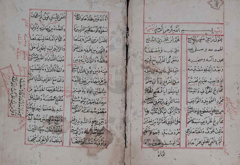 نسخة مخطوطة من المقدمة في ما يجب على قارئ القرآن أن يعلمه المعروفة بـ المقدمة الجزرية